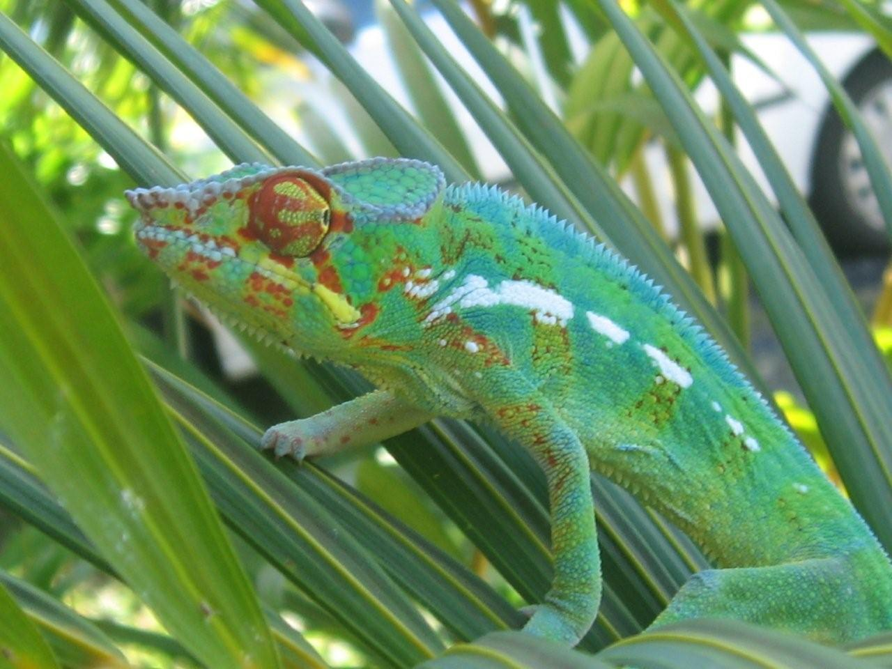 Foto de una camaleón que se sacó en un jardín de la isla Reunión